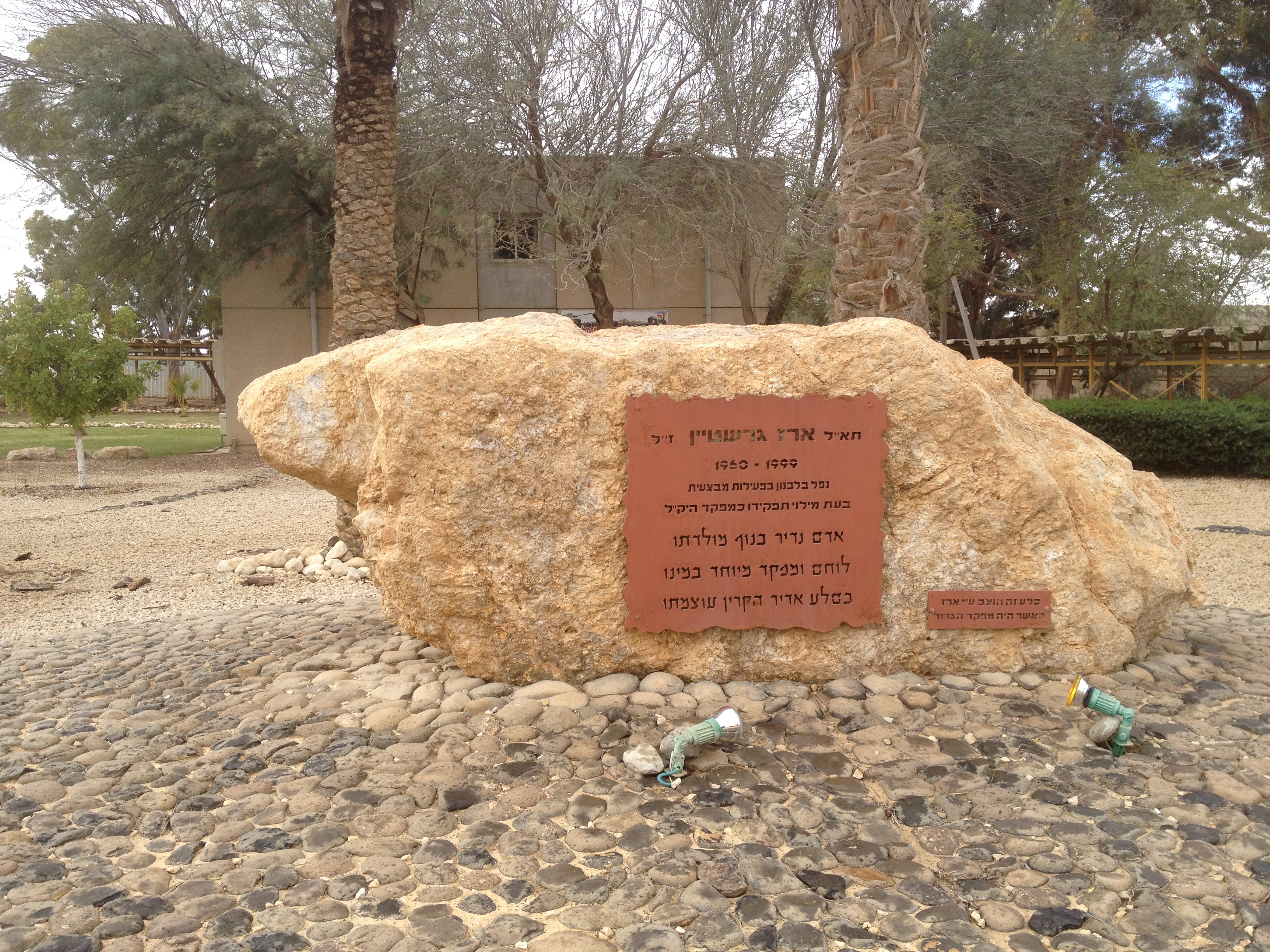 אנדרטה לתאל ארז גרשטיין זל בבסיס ביסל"ח 17 בו שימש ארז בעבר כמפקד גדוד.